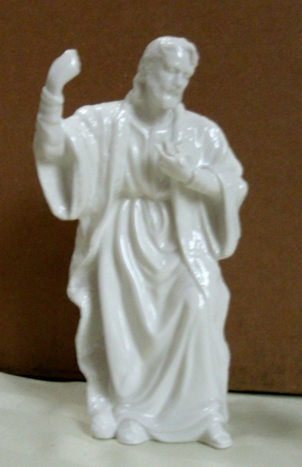 Porcelain